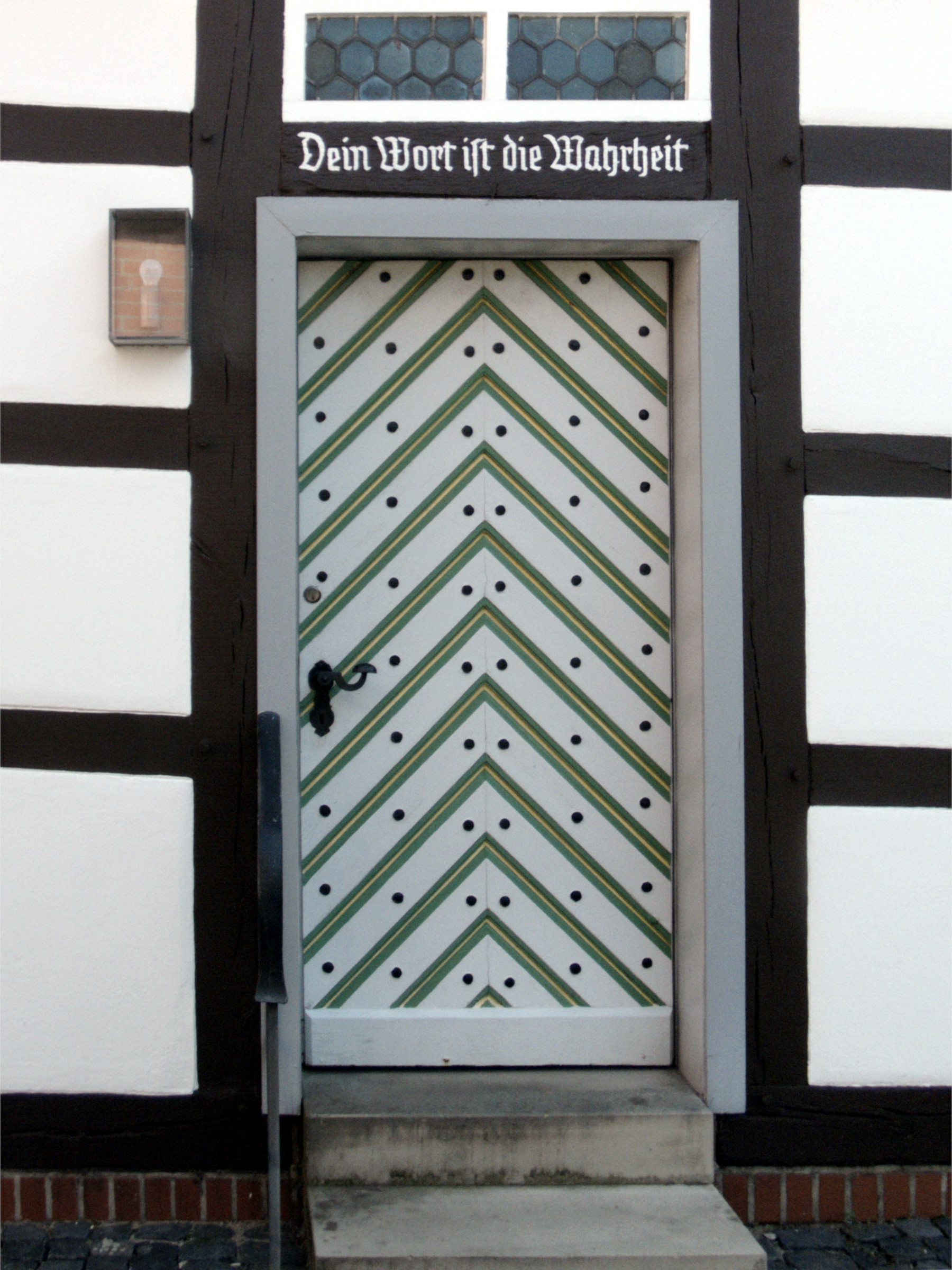 Die "Kapelle Northen" ist eine denkmalgeschützte Fachwerkkapelle in Northen, einem Stadtteil von Gehrden in der Region Hannover in Niedersachsen.